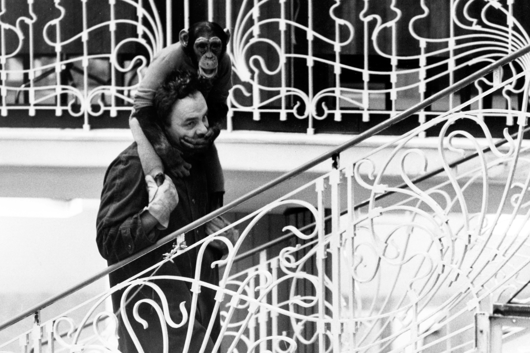 Arnulf Rainer, Körperkunst, 1979, ein Film von Herbert Brödl